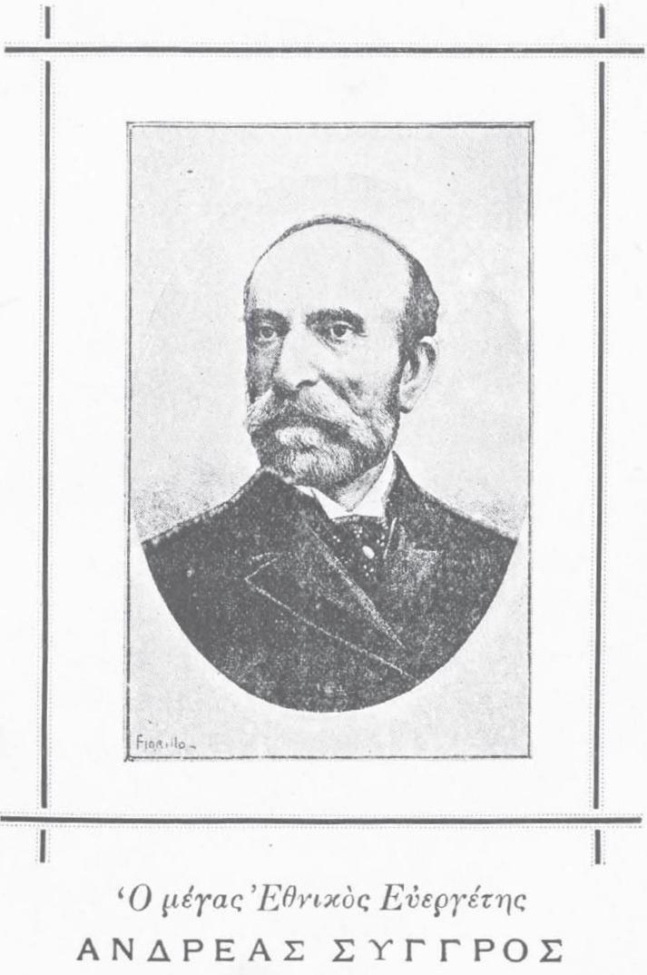 namhafte griechische Persönlichkeit, 19. Jahrhundert